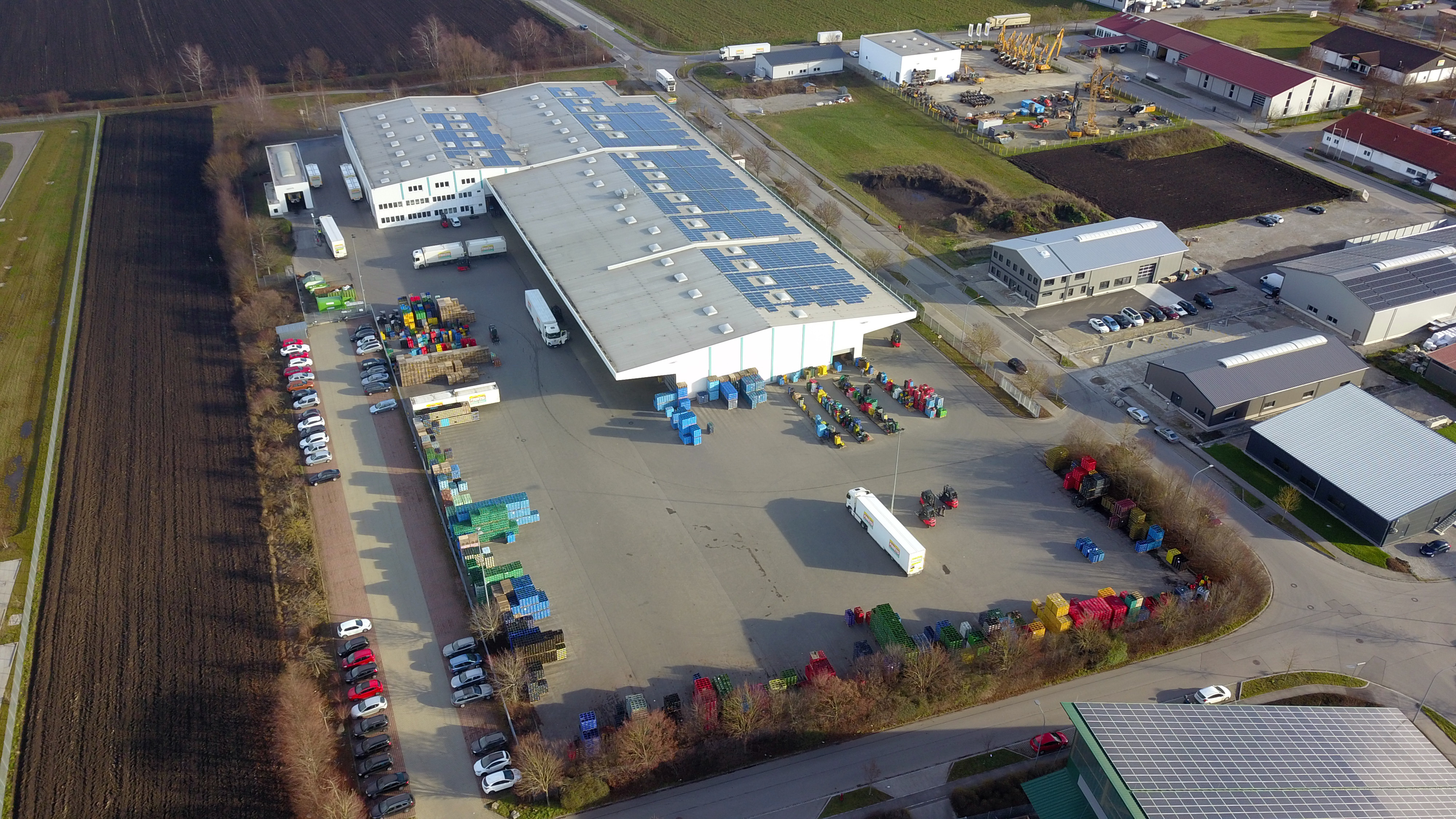 Firmenzentrale der Fristo Getränkemarkt GmbH im Buchloer Gewerbegebiet Nordwest